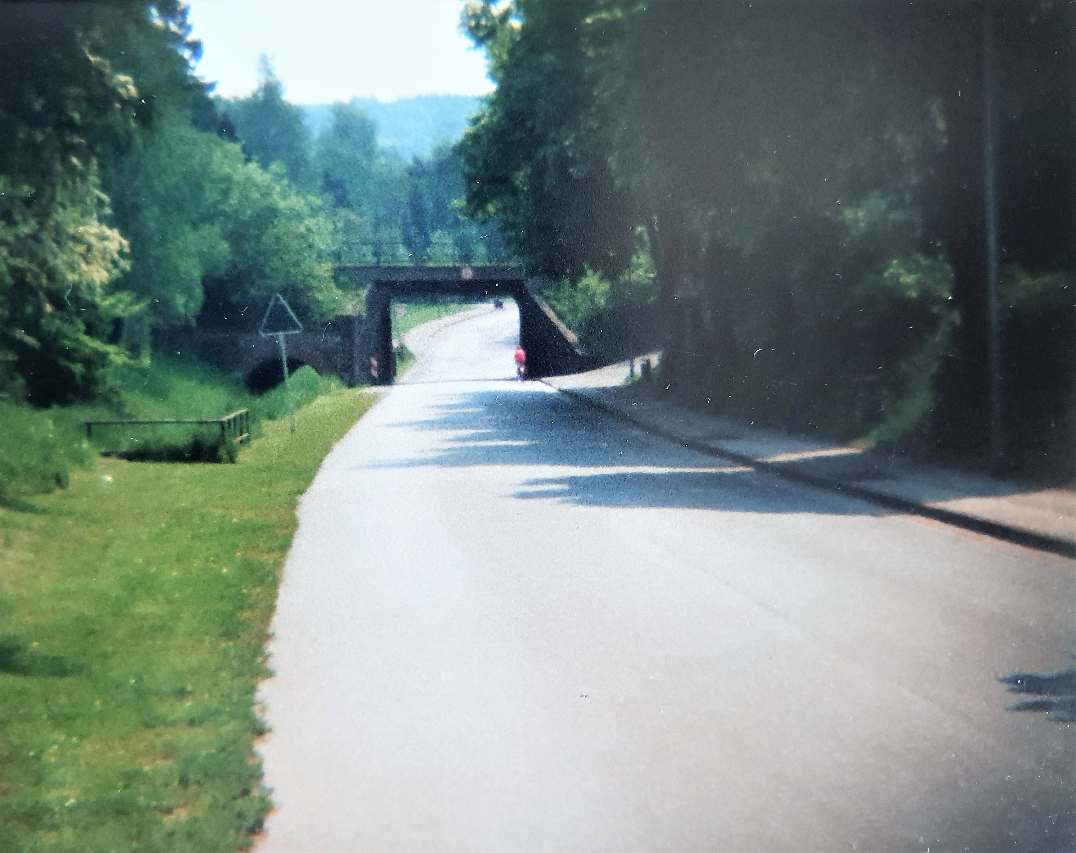 Westfalenstraße in Höxter-Lüchtringen 1988 mit Blick zum Heuweg. Links verläuft der Otterbach dann unterirdisch weiter zur Weser. Hinten ist die frühere Brücke der Bahnstrecke Holzminden–Scherfede (Streckennetznummer 2973) zu sehen.